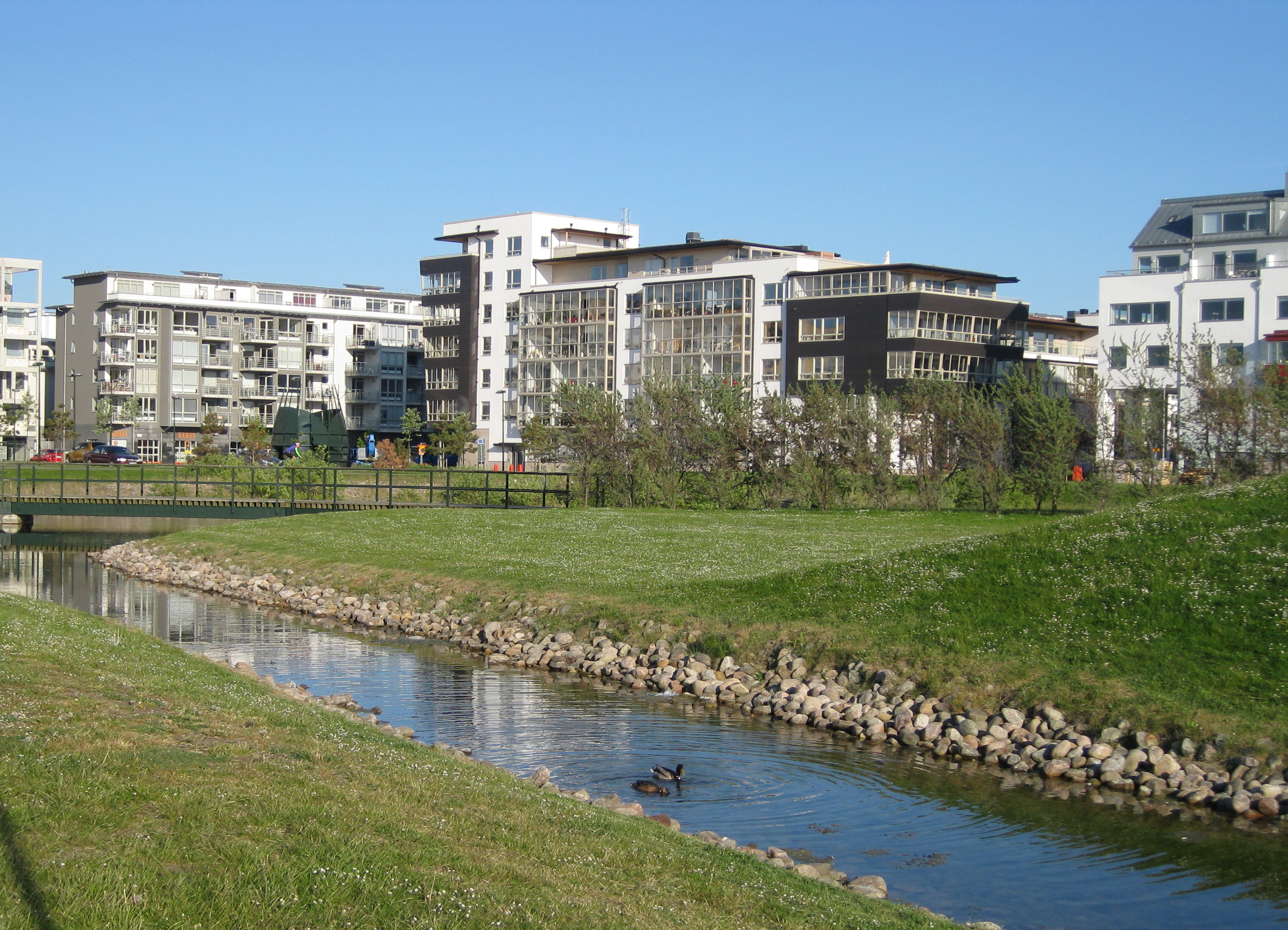 Scaniaparken in Malmö, Sweden